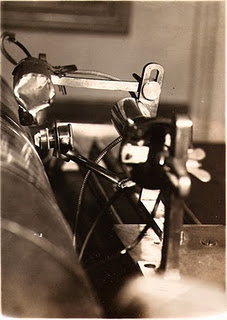 Pick up del fotoliptófono.